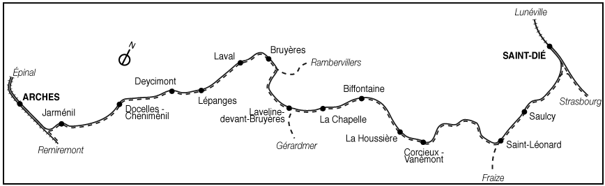 Schéma de la 062 du réseau ferré français